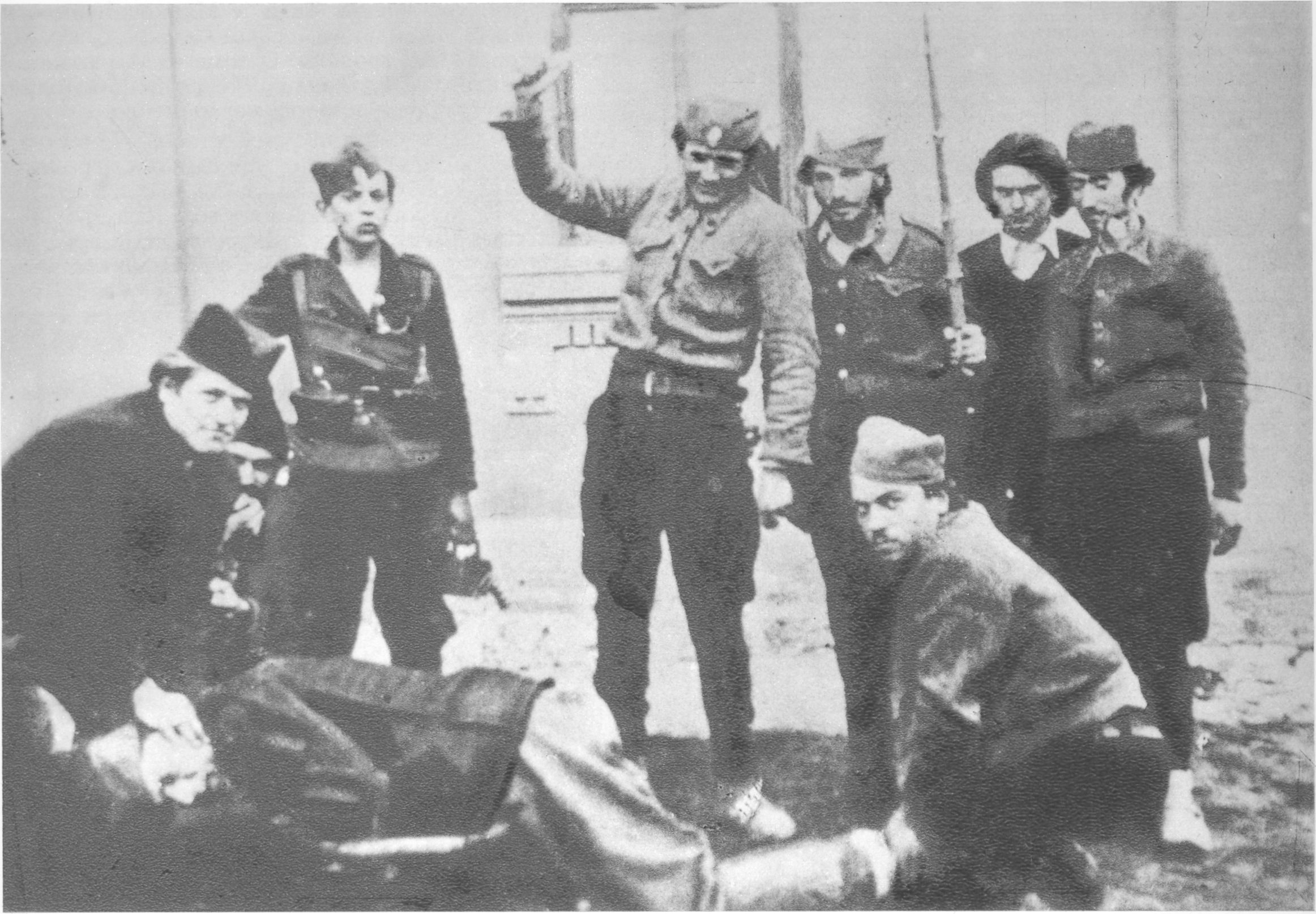 Српски (ћирилица): Четници батинају сељака у Србији.